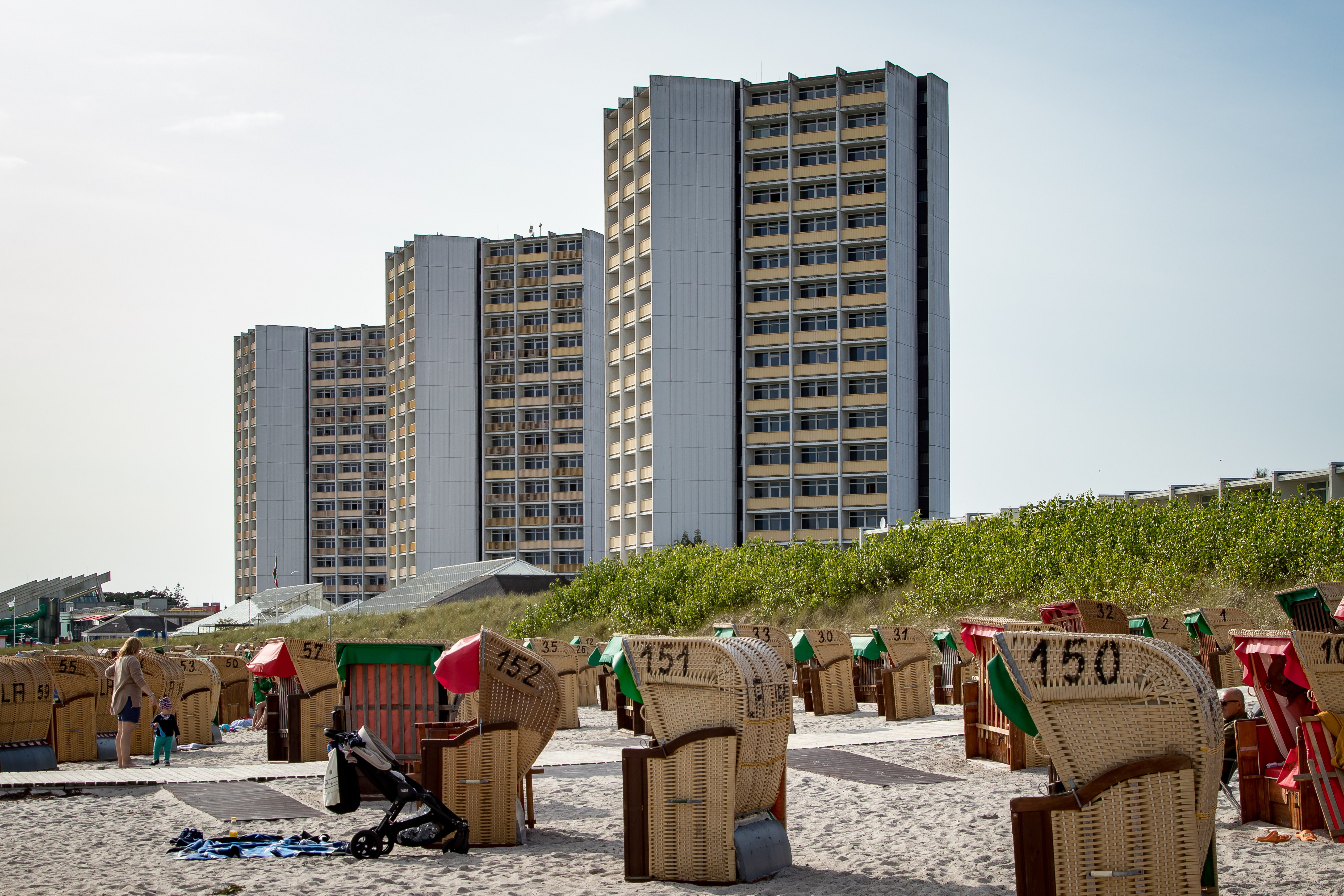 IFA Fehmarn Hotel & Ferien-Centrum am Südstrand / Burgtiefe auf Fehmarn